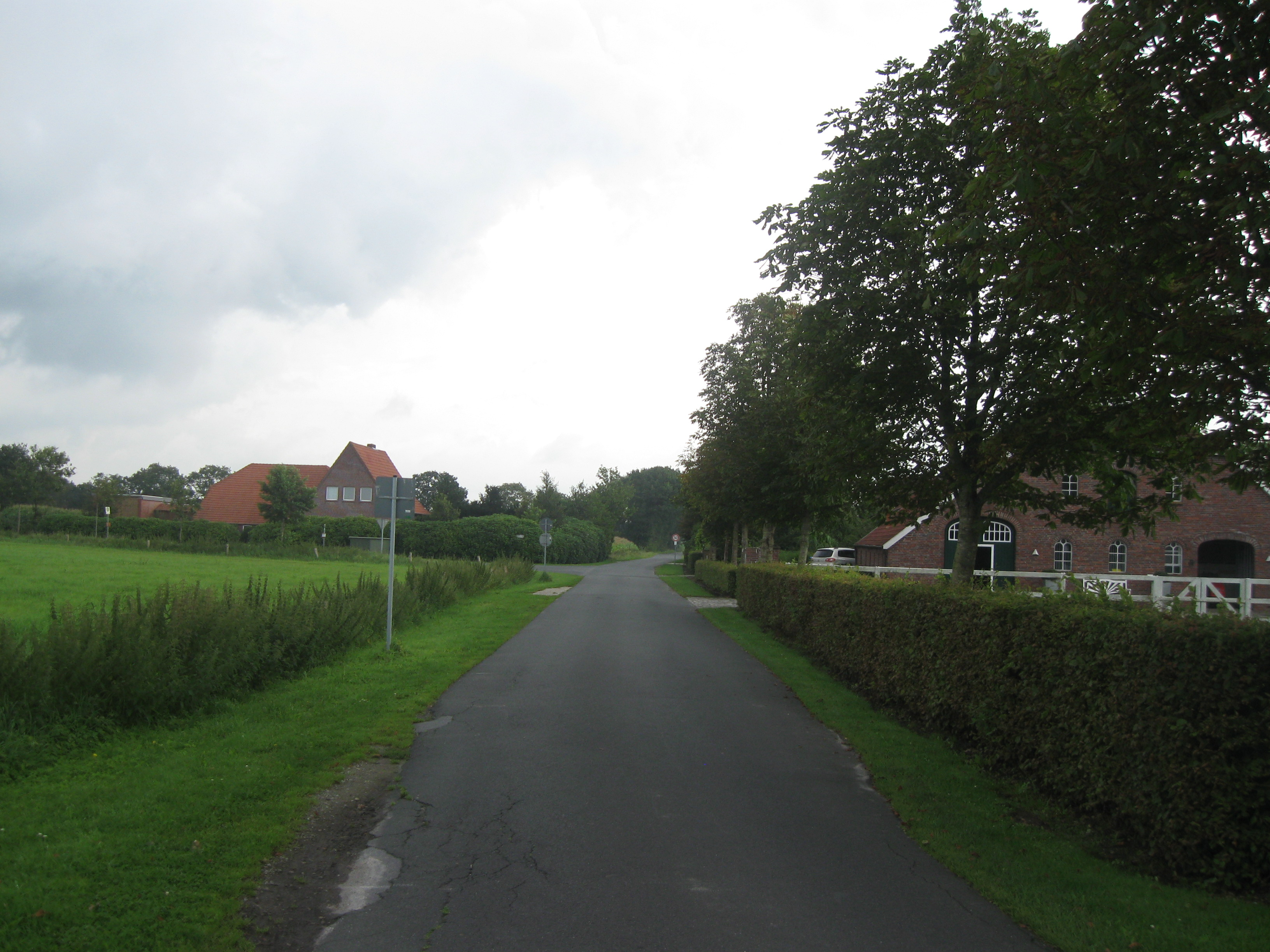 Poggenkrug